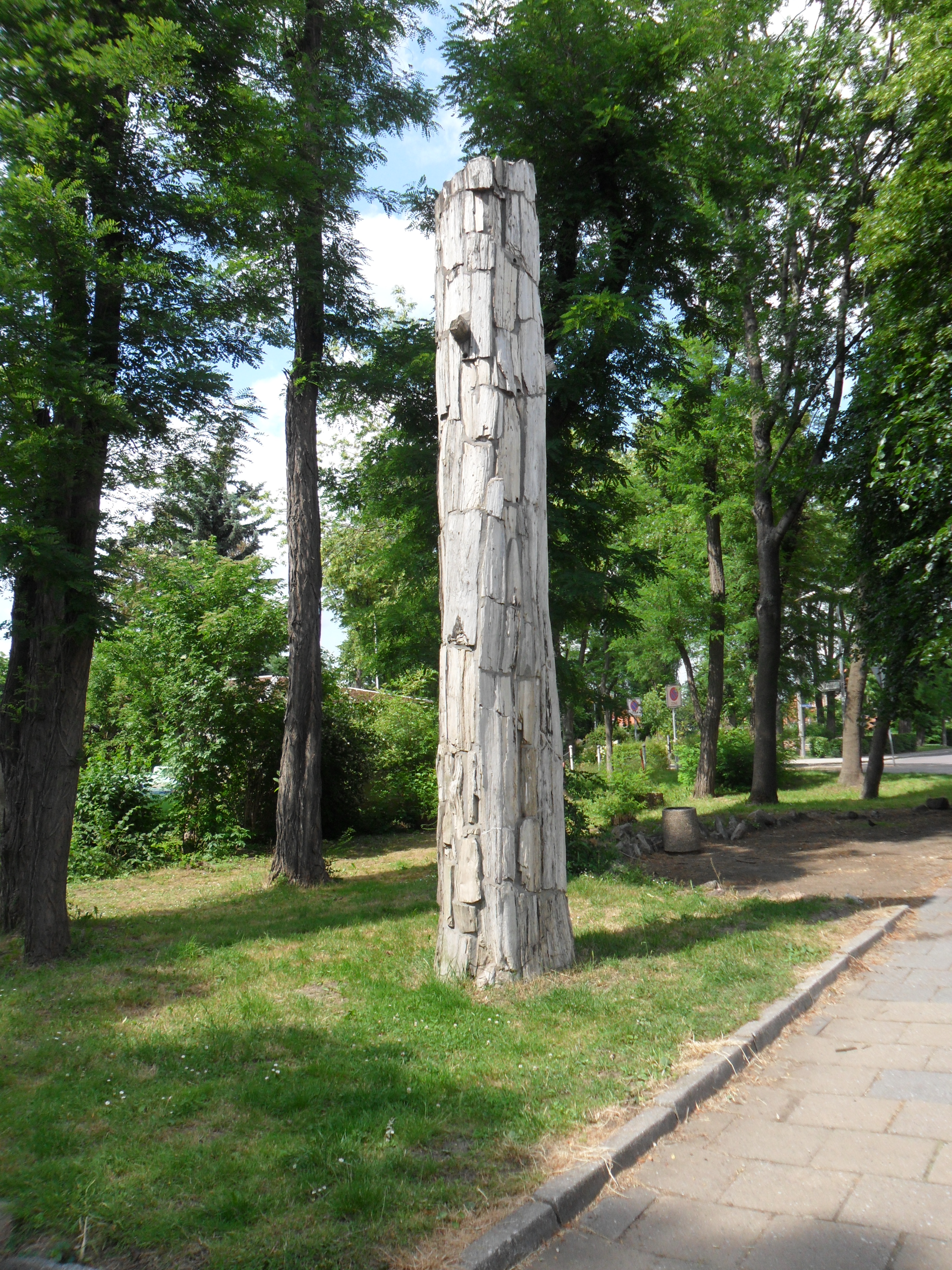 Etwa 33 Millionen Jahre alte versteinerte Zeder in einer Grünanlage gegenüber der Einmündung der Bahnhofstraße in die Leipziger Straße/Werkstraße südöstlich des Bahnhofes in Böhlen bei Leipzig